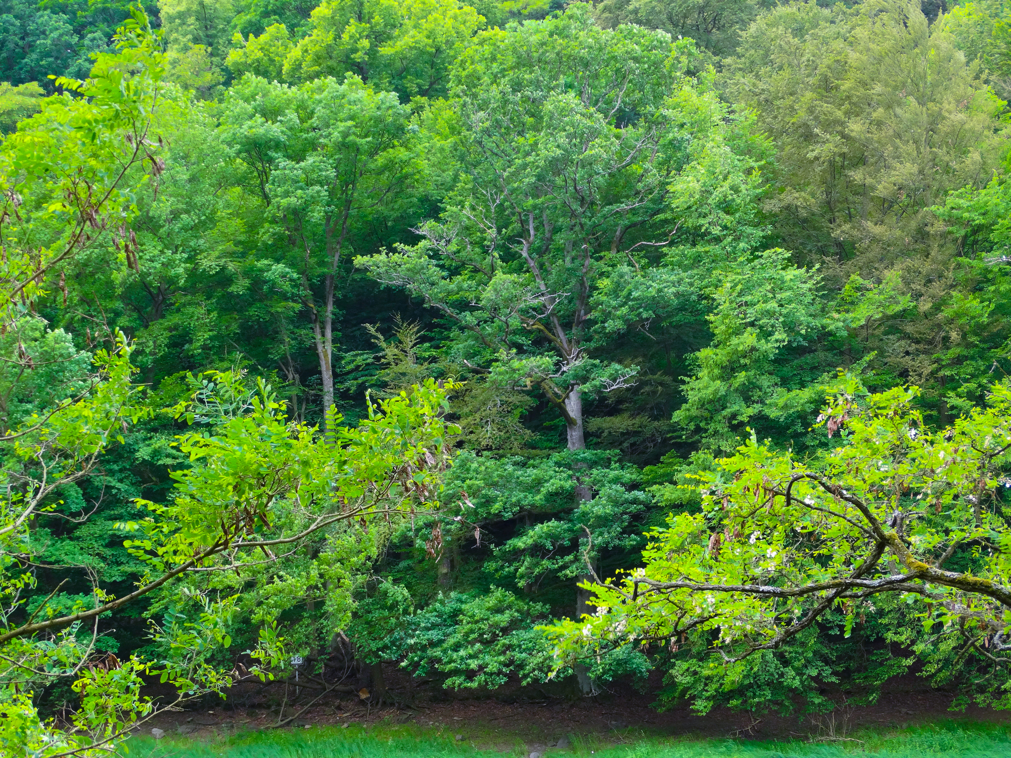 Im Nationalpark Kellerwald am Urwaldsteig Kellerwald-Edersee: Am Rand des Buchenwaldes.